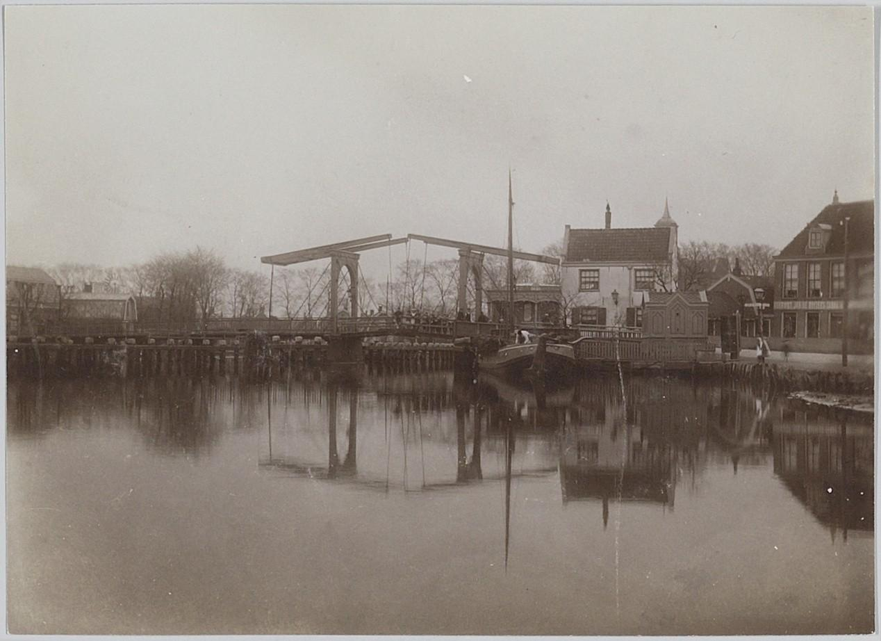 Beschrijving Ouderkerk aan de Amstel, gezien in zuidelijke richting vanaf de Amstel Rechts de Amsteldijk-Zuid en in het verschiet de torenspits van de Nederlands hervormde kerk. Documenttype foto Vervaardiger Onbekend Anoniem Collectie Collectie Stadsarchief Amsterdam: foto-afdrukken Datering 1905 ca. Geografische naam Ouderkerk aan de Amstel Amstel Amsteldijk-Zuid (Amstelveen) Inventarissen Afbeeldingsbestand ANWC00301000001